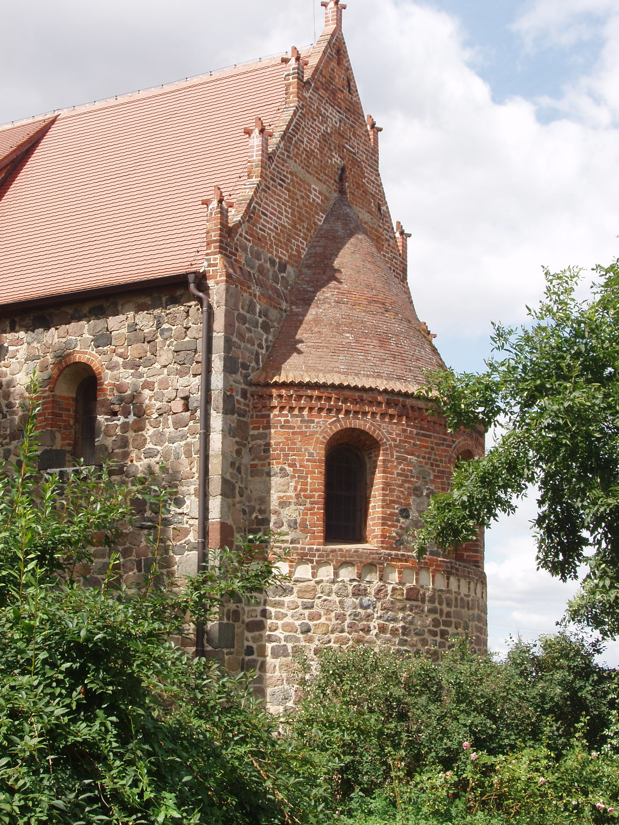 Der mit Türmchen verzierte Giebel des Kirchenschiffs mit der kleinen, wenig ausladenden Apsis der aus sorgfältig zu Quadern behauenen Feldsteinen errichteten Klosterkirche in Krevese.